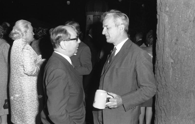 Fest in der Berliner Landesvertretung "Berliner Laubenpiper"